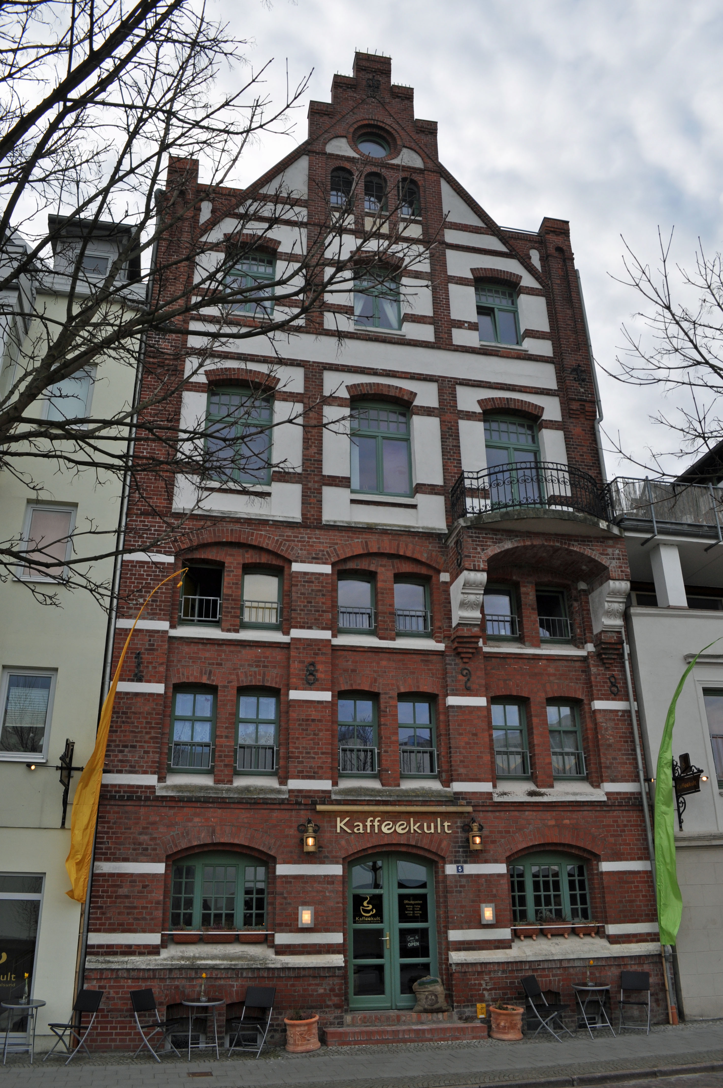 Gebäude bzw. Gebäudedetail in Stralsund. Straße und Hausnummer siehe Dateiname.